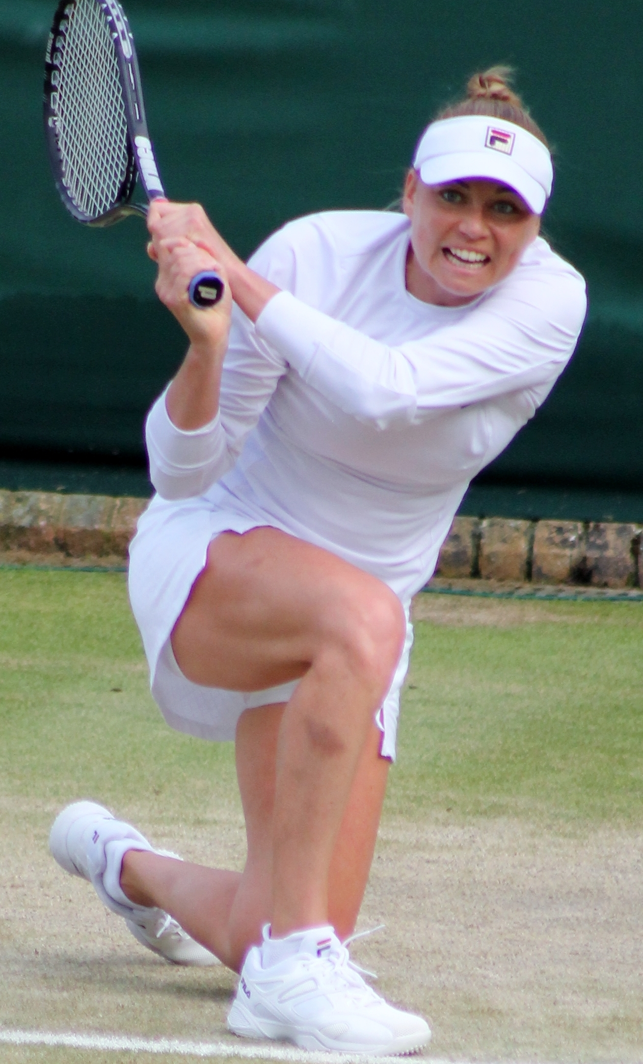 Zvonareva WM14 (4)